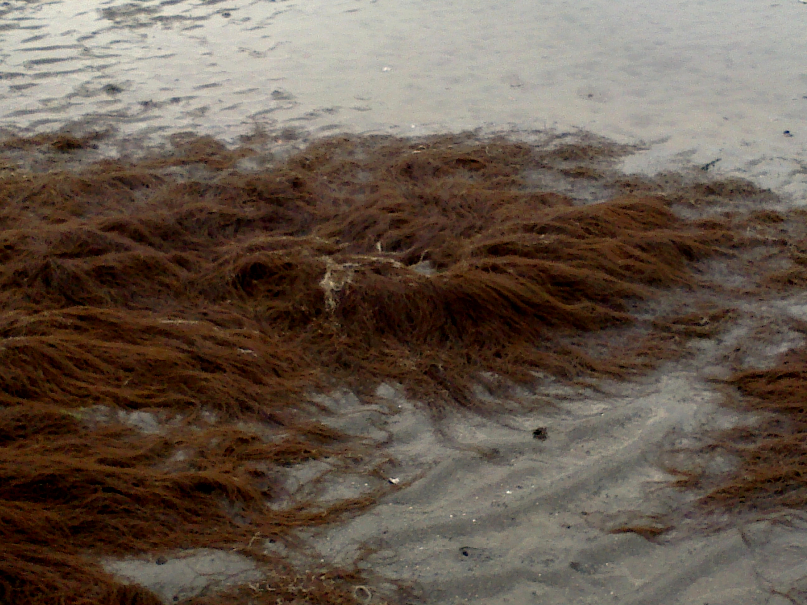 Pelillo, Gracilaria chilensis, en la playa de Putique, isla Quinchao, Chile